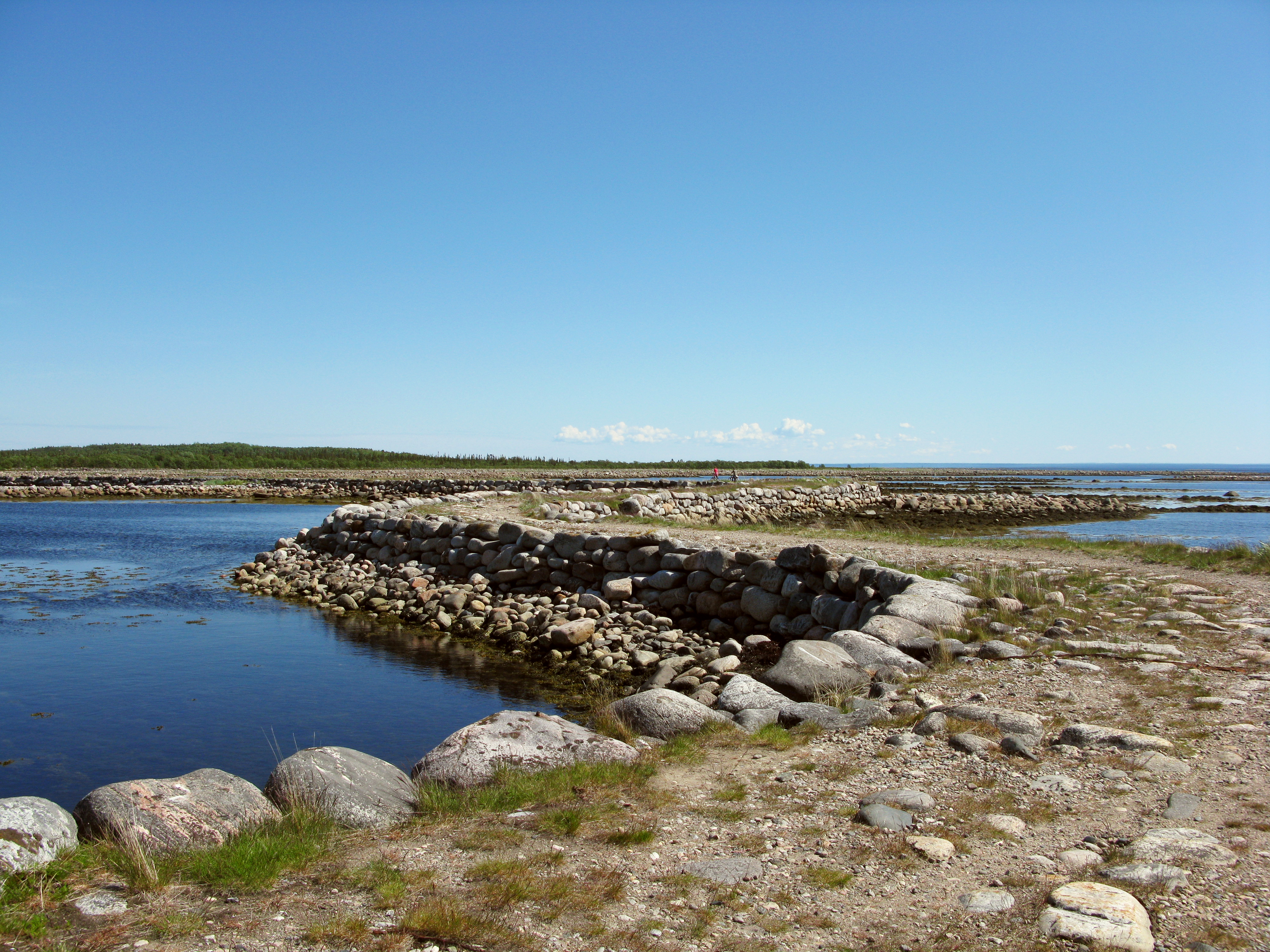 Дамба между островами Большая Муксалма и Большой Соловецкий: Пролив Железные ворота, Соловецкий район, Архангельская область